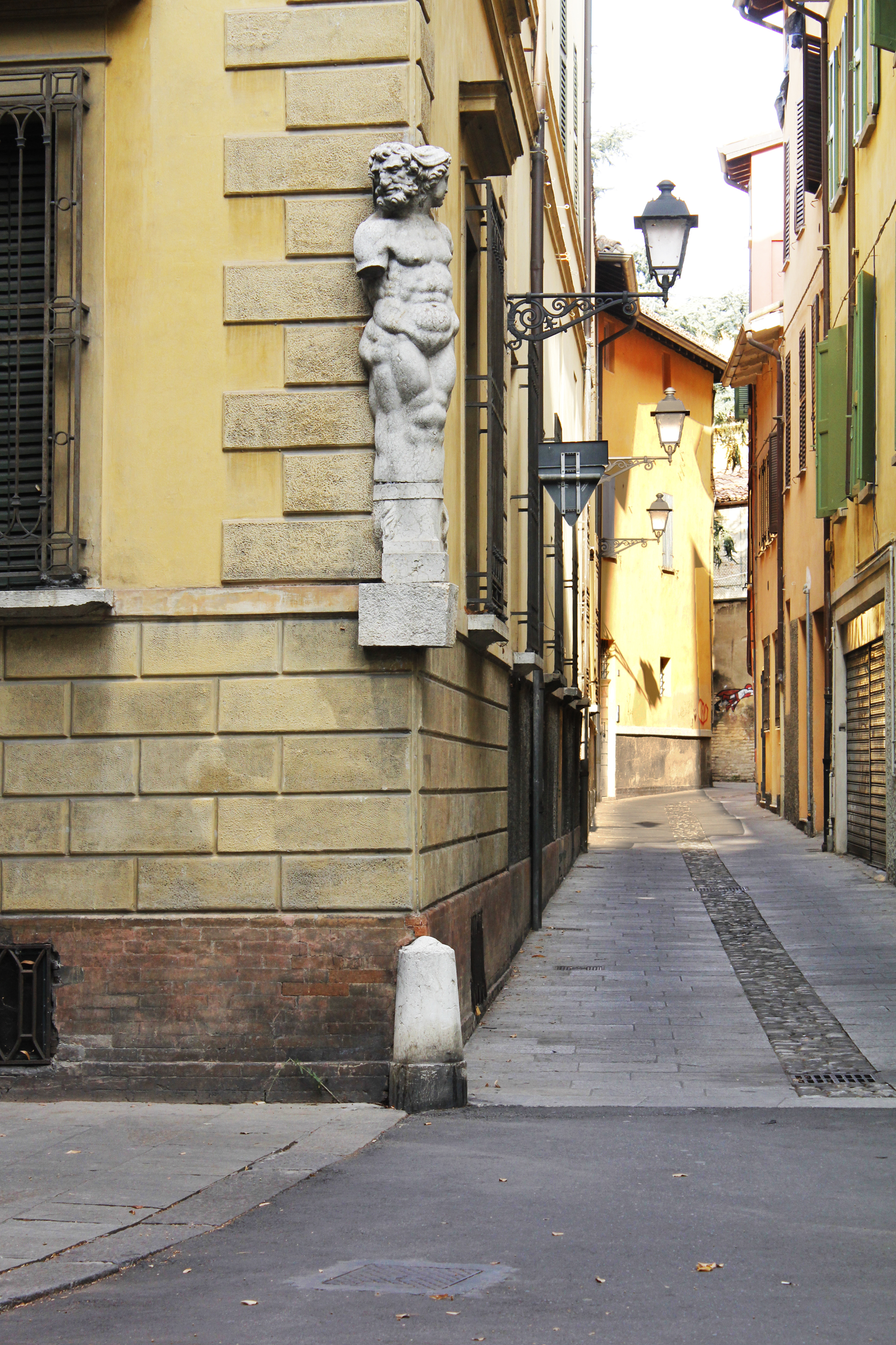 Palazzo Magnani This is a photo of a monument which is part of cultural heritage of Italy.